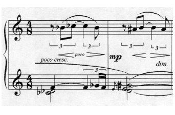 Part of Alexander Nikolajewitsch Skrjabin: Sonate op.68, Takt 36-37